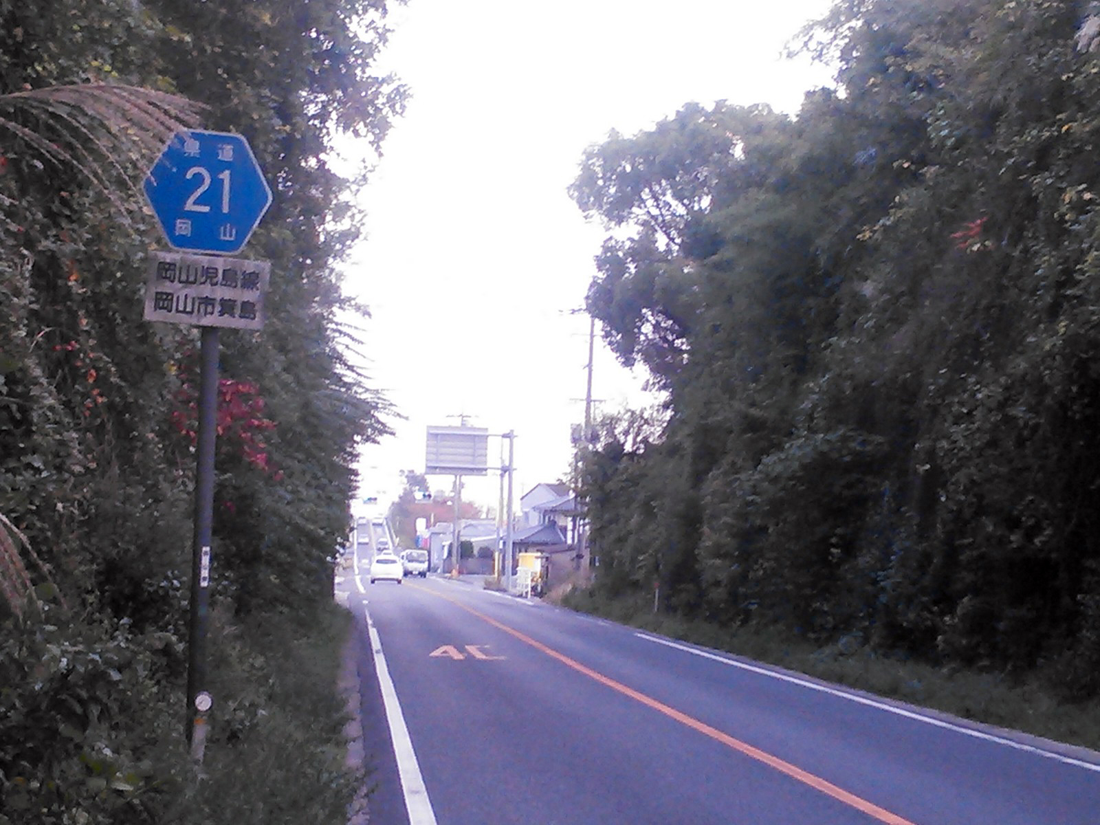 岡山県道21号岡山児島線本線、箕島地区。投稿者本人による撮影。